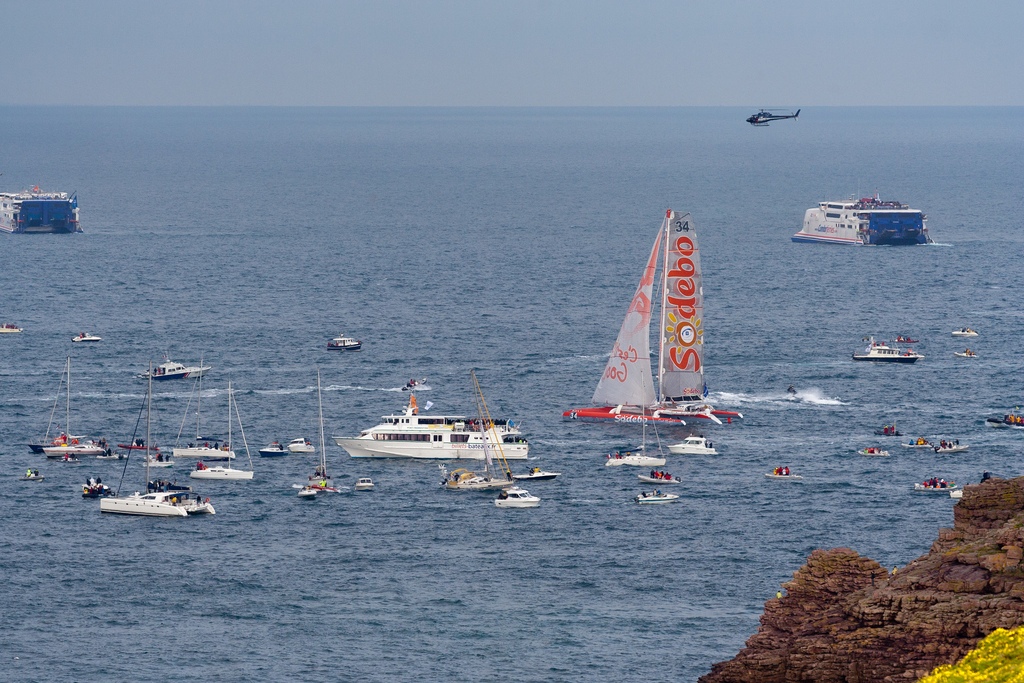 Route du Rhum 2010, Bretagne Canon 70-200mm f4L IS